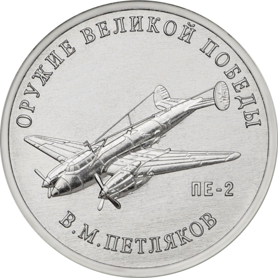 Монета Банка России. 25 рублей, реверс, анциркулейтед. Медно-никелевый сплав. Серия «Оружие Великой Победы (конструкторы оружия)». Конструктор В.М. Петляков, самолёт Пе-2. Рельефное изображение пикирующего бомбардировщика Пе-2, под ним справа – надпись «ПЕ-2»; вдоль канта – надписи, вверху: «ОРУЖИЕ ВЕЛИКОЙ ПОБЕДЫ», внизу: «В.М. ПЕТЛЯКОВ». Художник: А.В. Гнидин. Скульптор: компьютерное моделирование. Московский монетный двор.